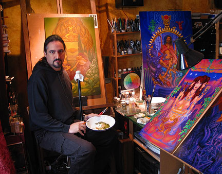 Laurence Caruana in his Bastille studio, Paris, France